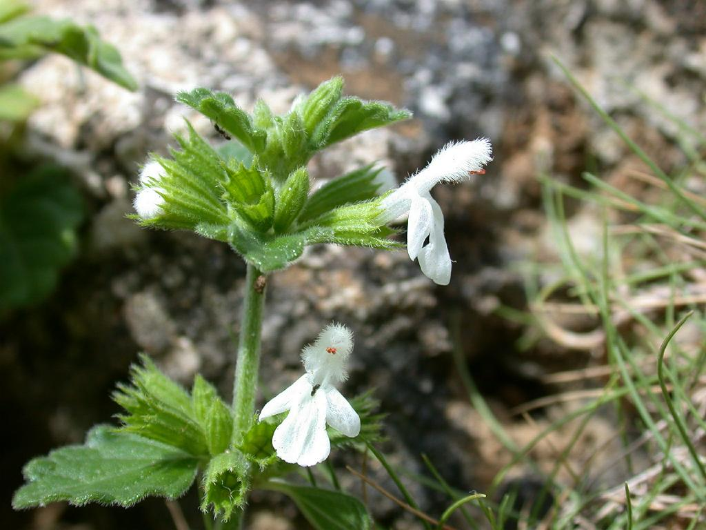 Leucas mollissima var chinensisヤンバルツルハッカ 2006/08/11 沖縄本島中部：Okinawa Island, Japan